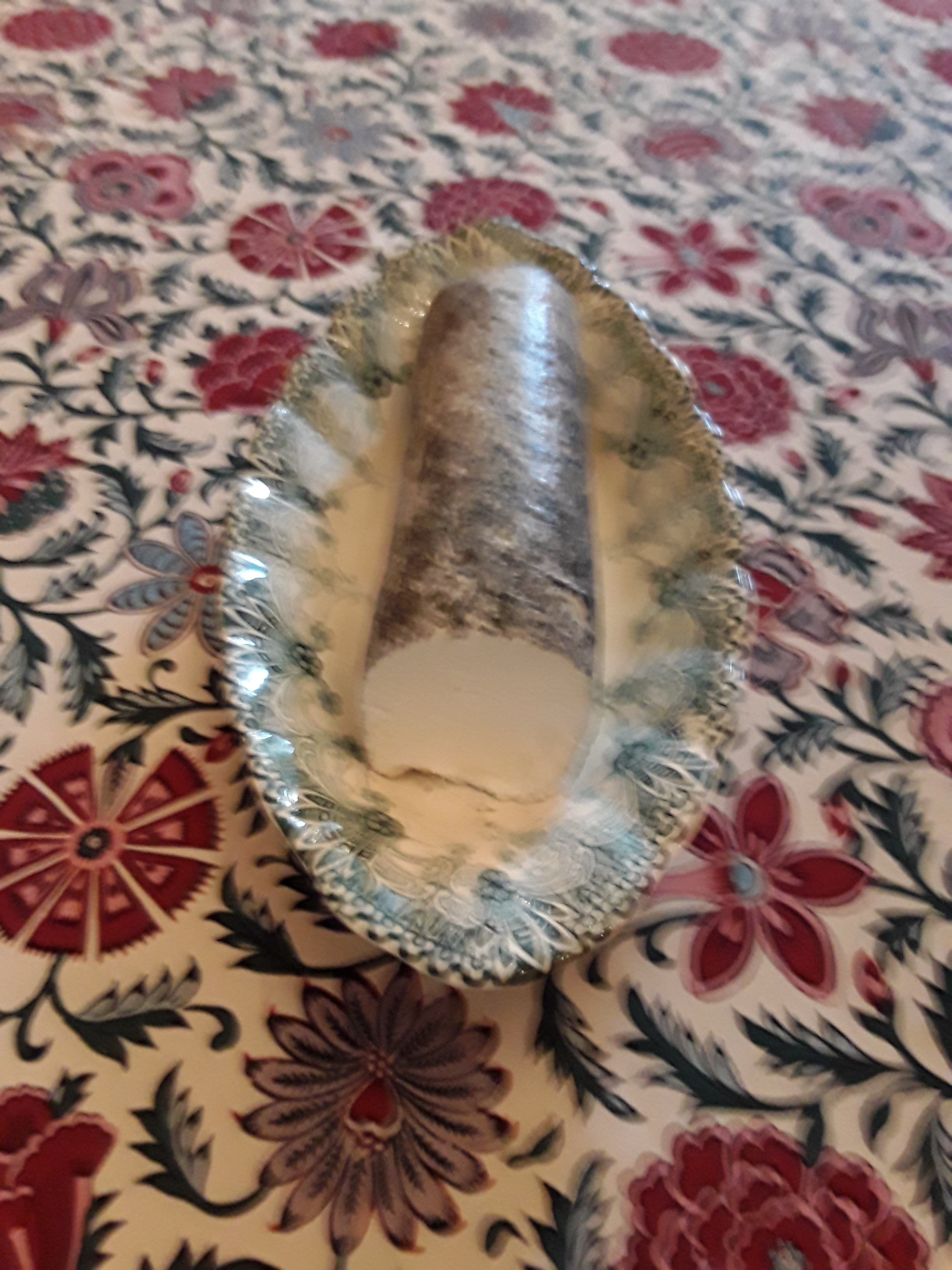 Fromage de chêvre frais produit à Sainte-Maure-de-Touraine (France), salé et cendré